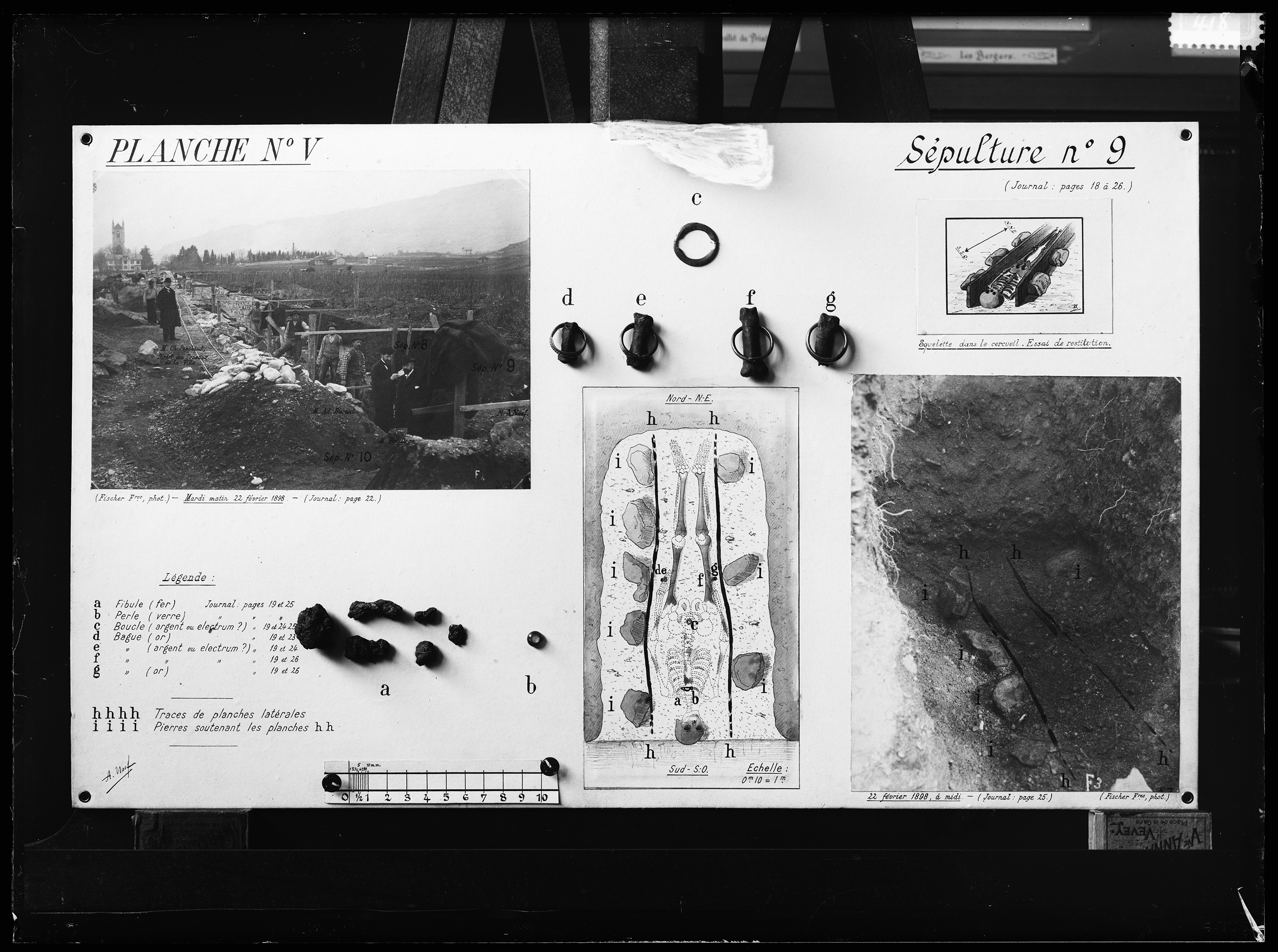 Planche no V, légende "Sépulture no 9" dont des fibules, bagues, perles et boucles.